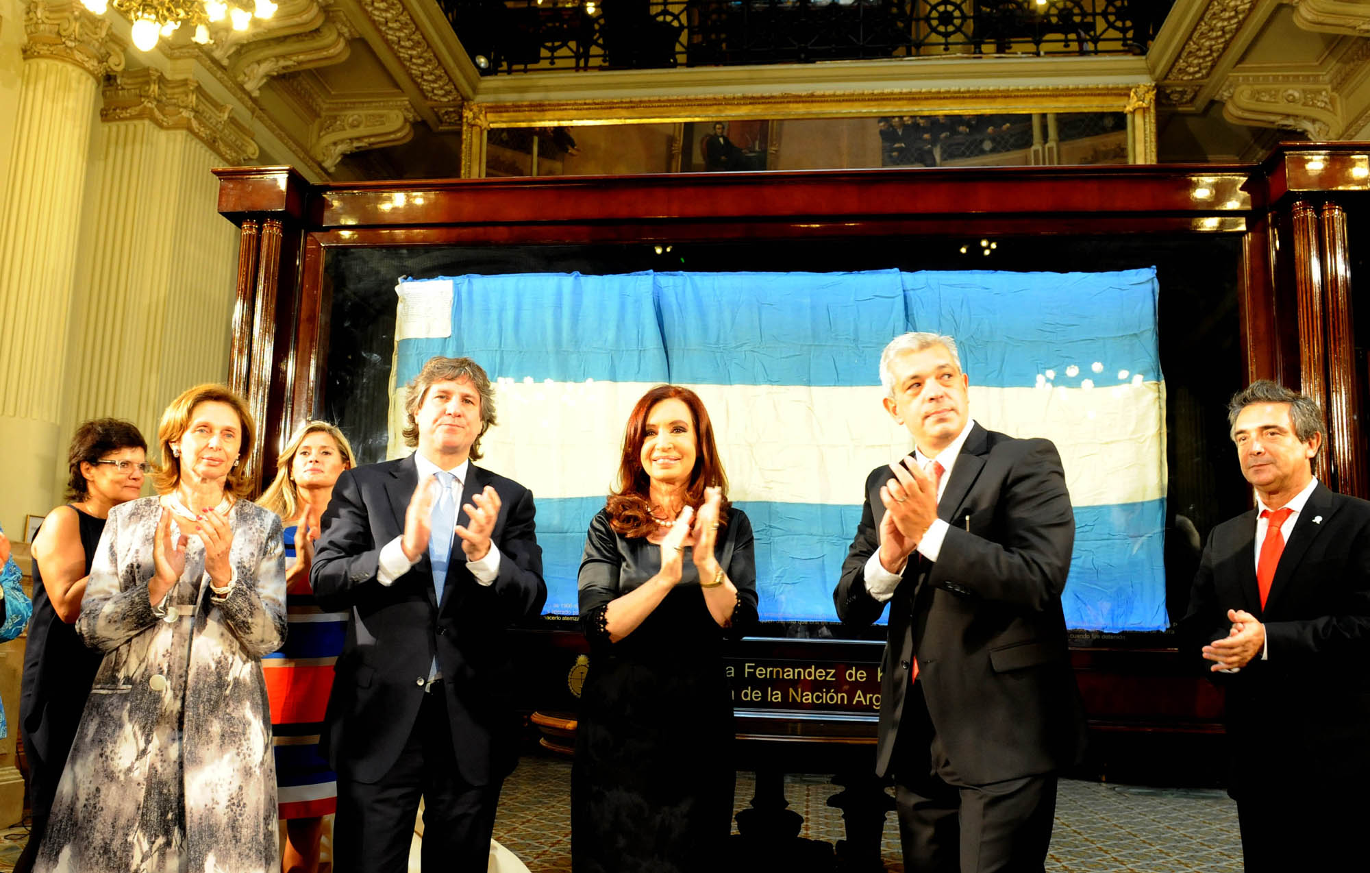 Cristina Fernández inauguró hoy en el Congreso de la Nación el 131º período de sesiones ordinarias. La mandataria trazó un balance de su gestión y anunció el envío de proyectos de ley para democratizar la Justicia, como por ejemplo la elección directa de los miembros del Consejo de la Magistratura. Además, defendió el memorandum de entendimiento con Irán por la causa AMIA como medio de "buscar la verdad". Y volvió a reclamar al Reino Unido que se siente a dialogar por la soberanía de Malvinas. Antes de su discurso, la mandataria inauguró una vitrina ubicada en Pasos Perdidos que contiene una de las siete banderas que flamearon en las Islas Malvinas en el marco del Operativo Cóndor, en septiembre de 1966.